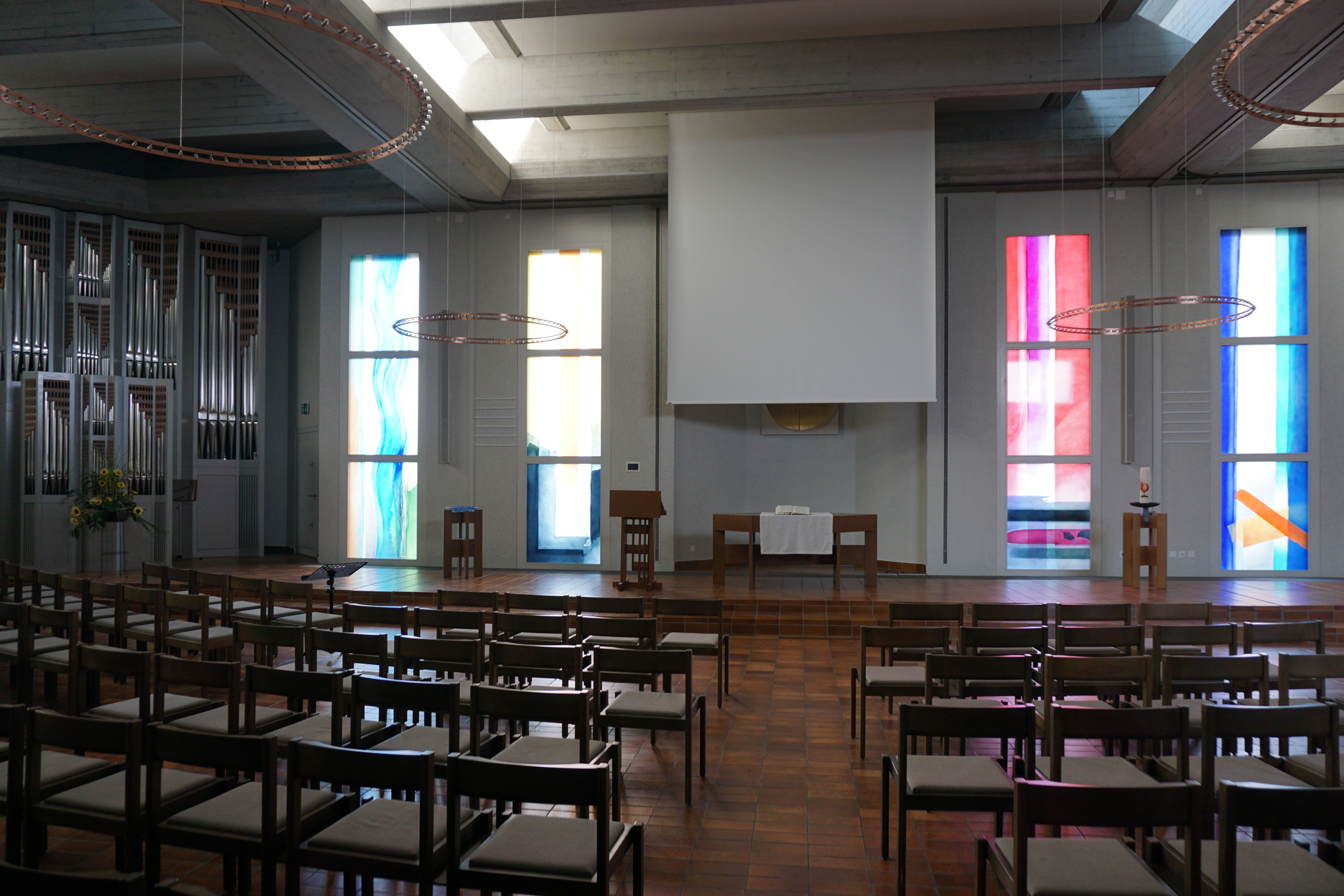 Innenraum der reformierten Kirche mit Glasfenstern von Andreas Felger